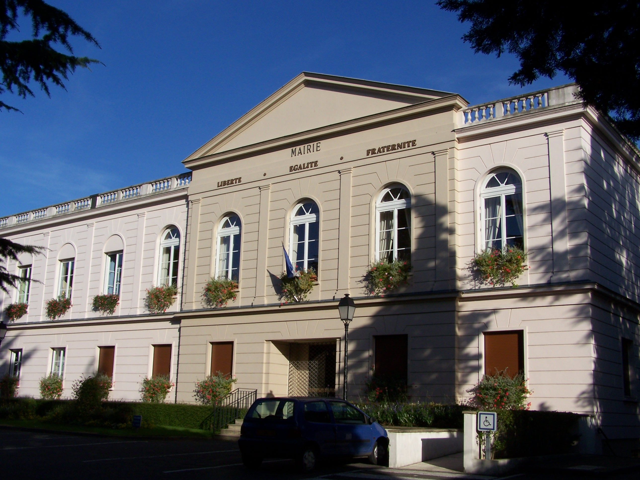 Mairie de Saint-Nom-la-Bretèche (Yvelines, France)